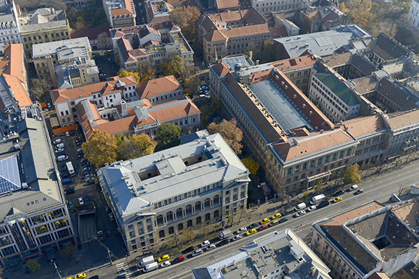 Trefort kert, bölcsész kar